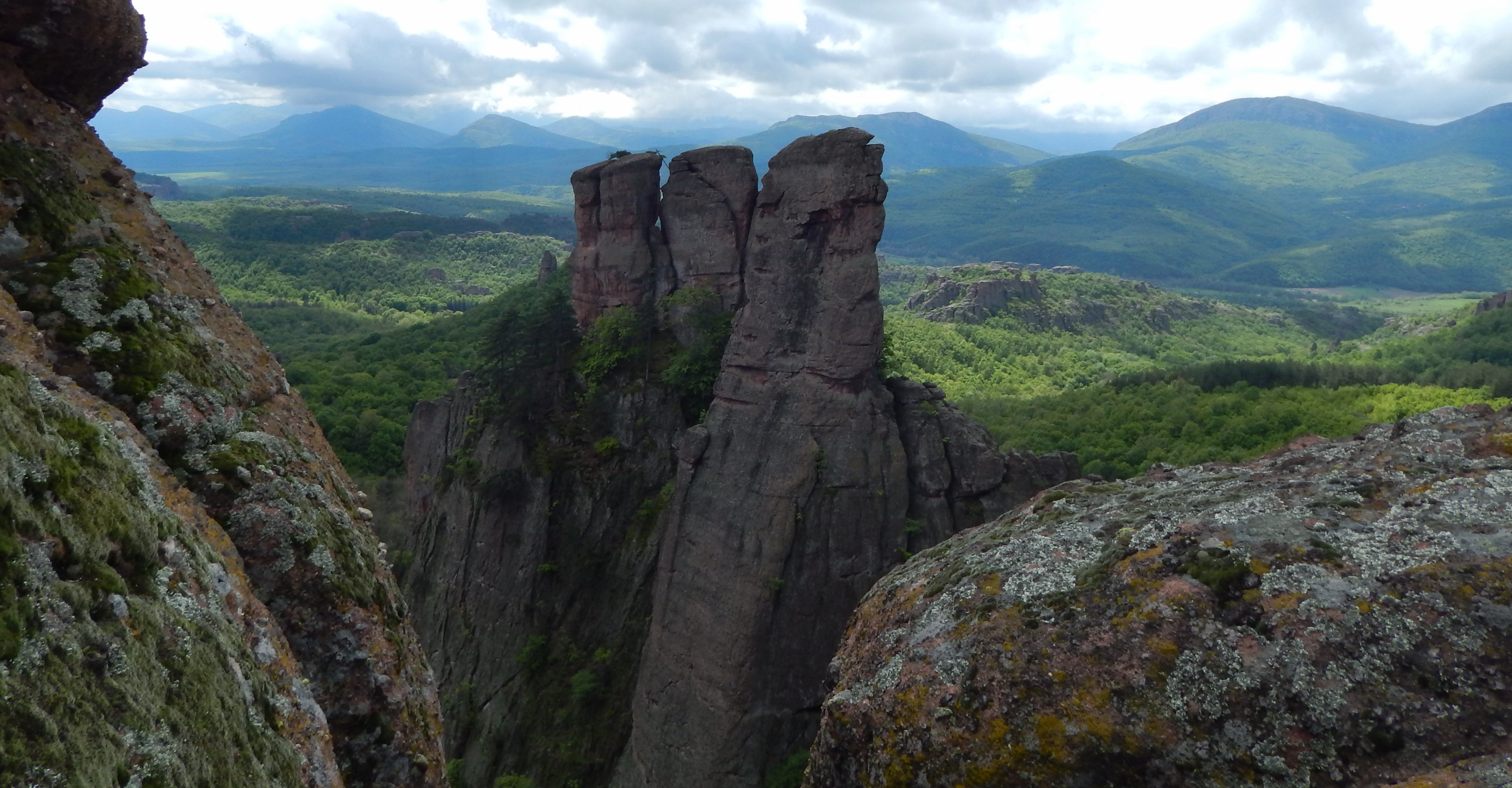 Чупрене